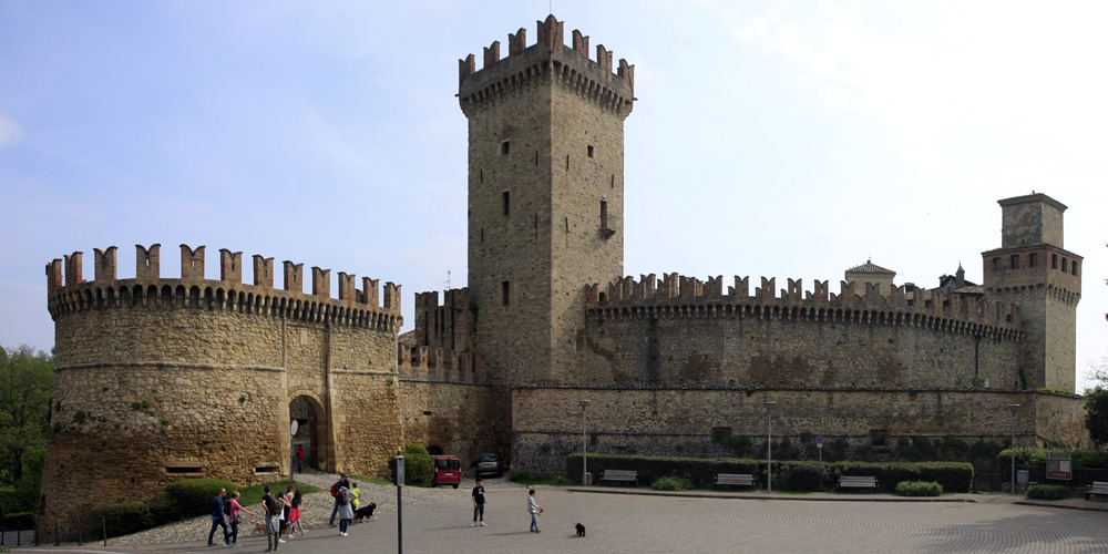 Veduta esterna del borgo fortificato di Vigoleno